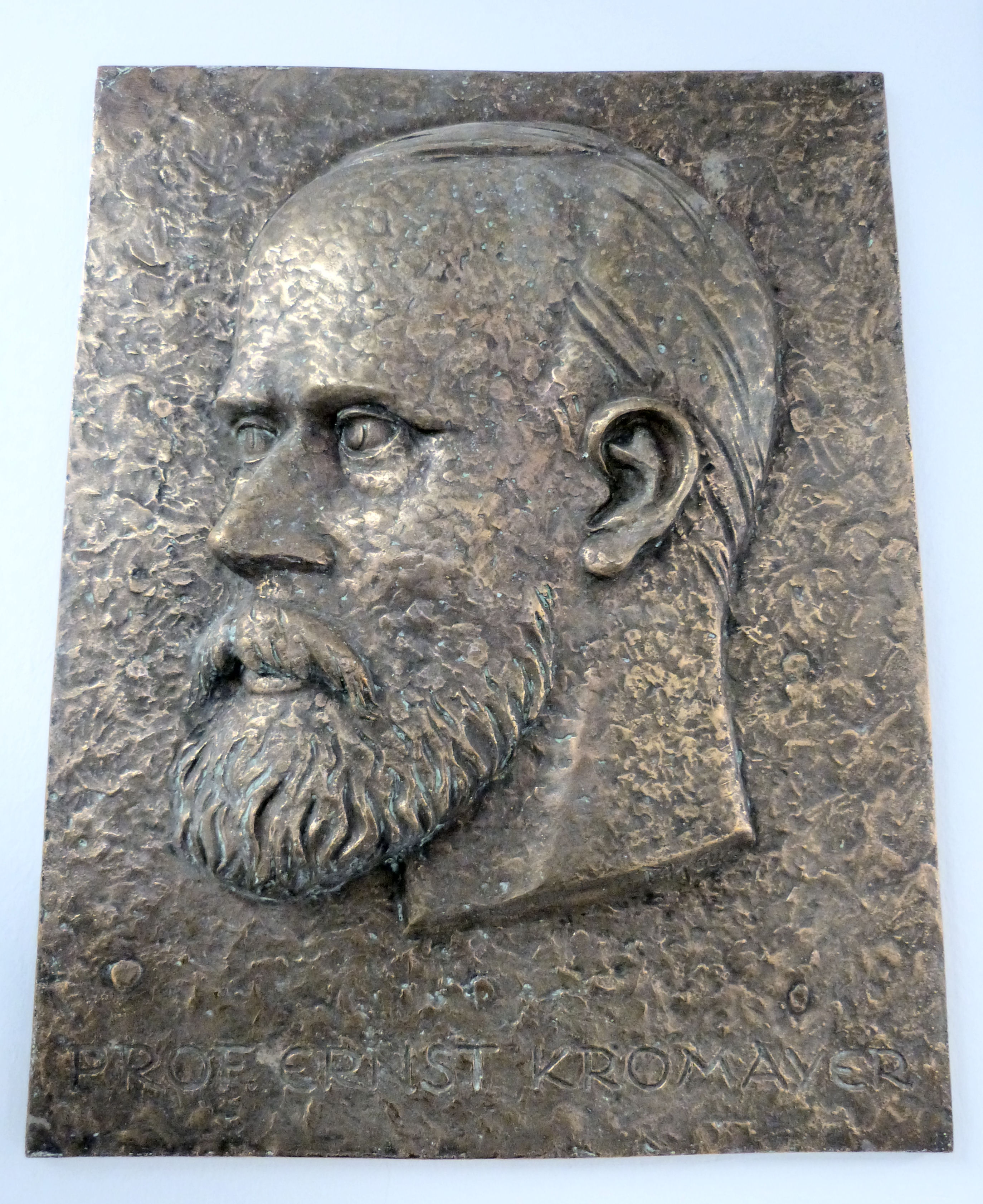 Bronzerelief des Dermatologen Ernst Kromayer (1862-1933), Bildhauer: Richard Horn 1962, Universitätsklinikum Halle-Kröllwitz, Klinik für Dermatologie und Venerologie